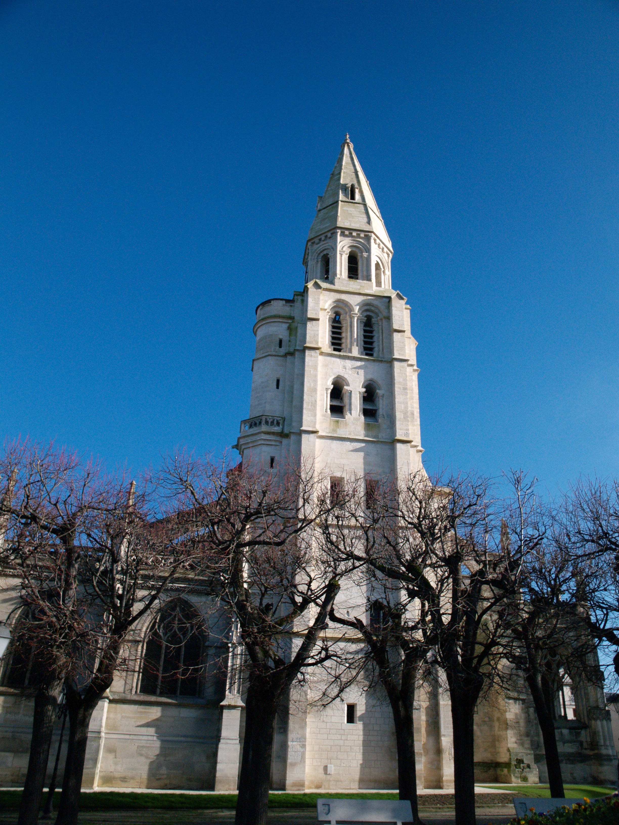 Eglise collégiale datant du XIIe siècle.